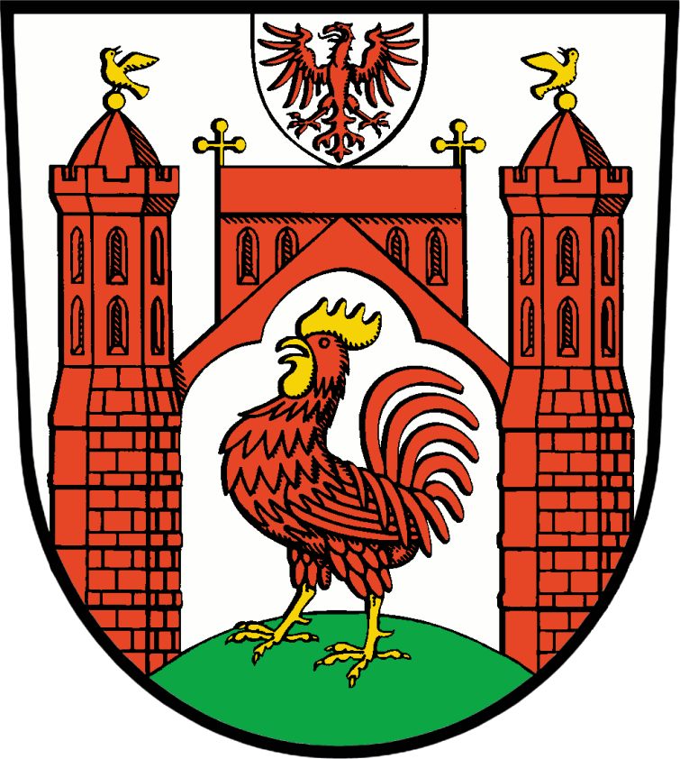 Wappen von Frankfurt (Oder)